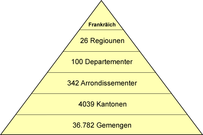 Territorial Administratioun vu Frankräich Source: Lëtzebuergesch Versioun vun Administration territoriale française.svg